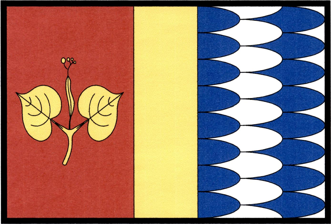 Vlajka obce Myslín.